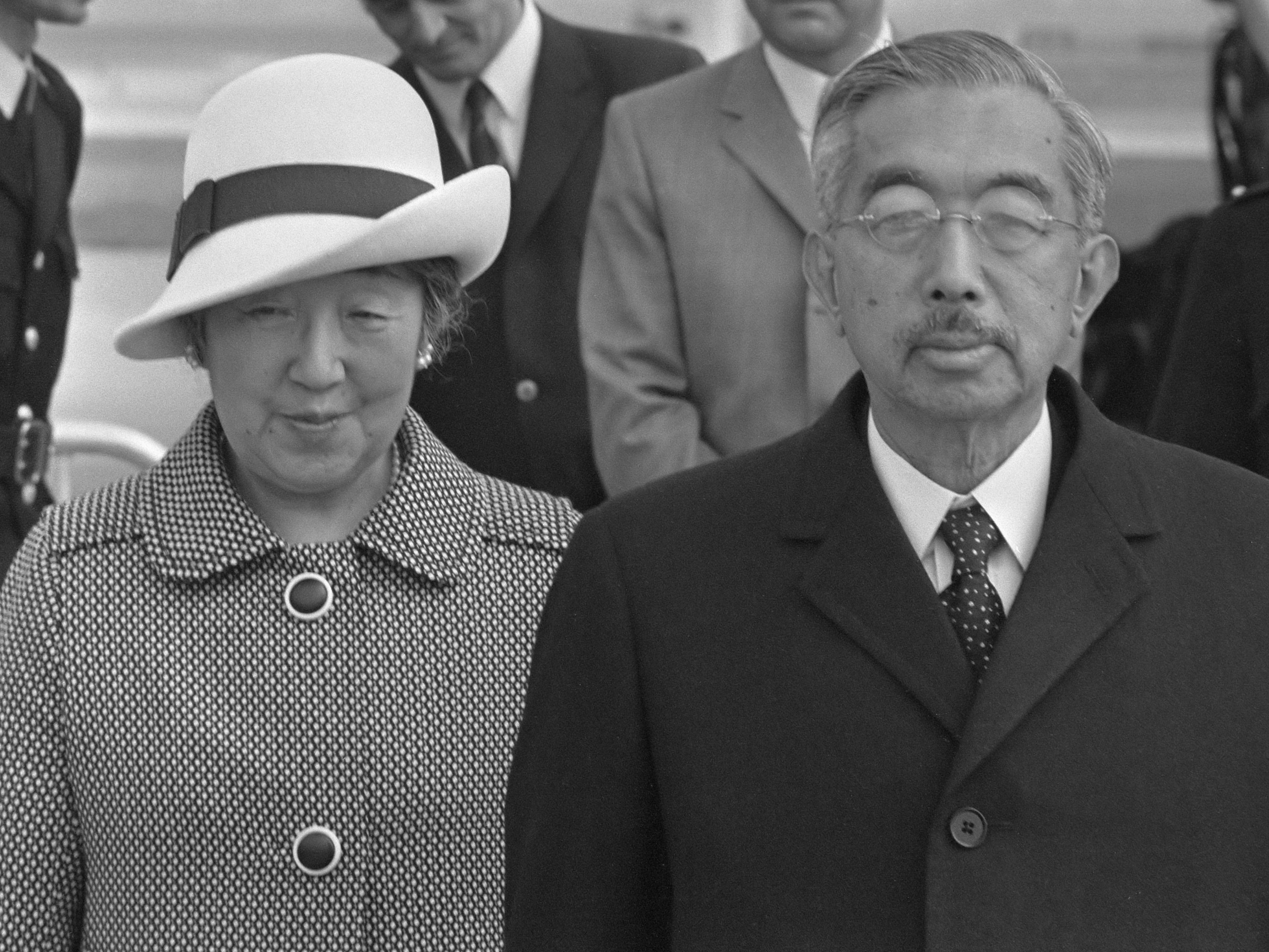 Tweedaags bezoek Keizer Hirohito en Keizerin Nagako aan Nederland, Keizer en Keizerin ten voeten uit, kop 8 oktober 1971